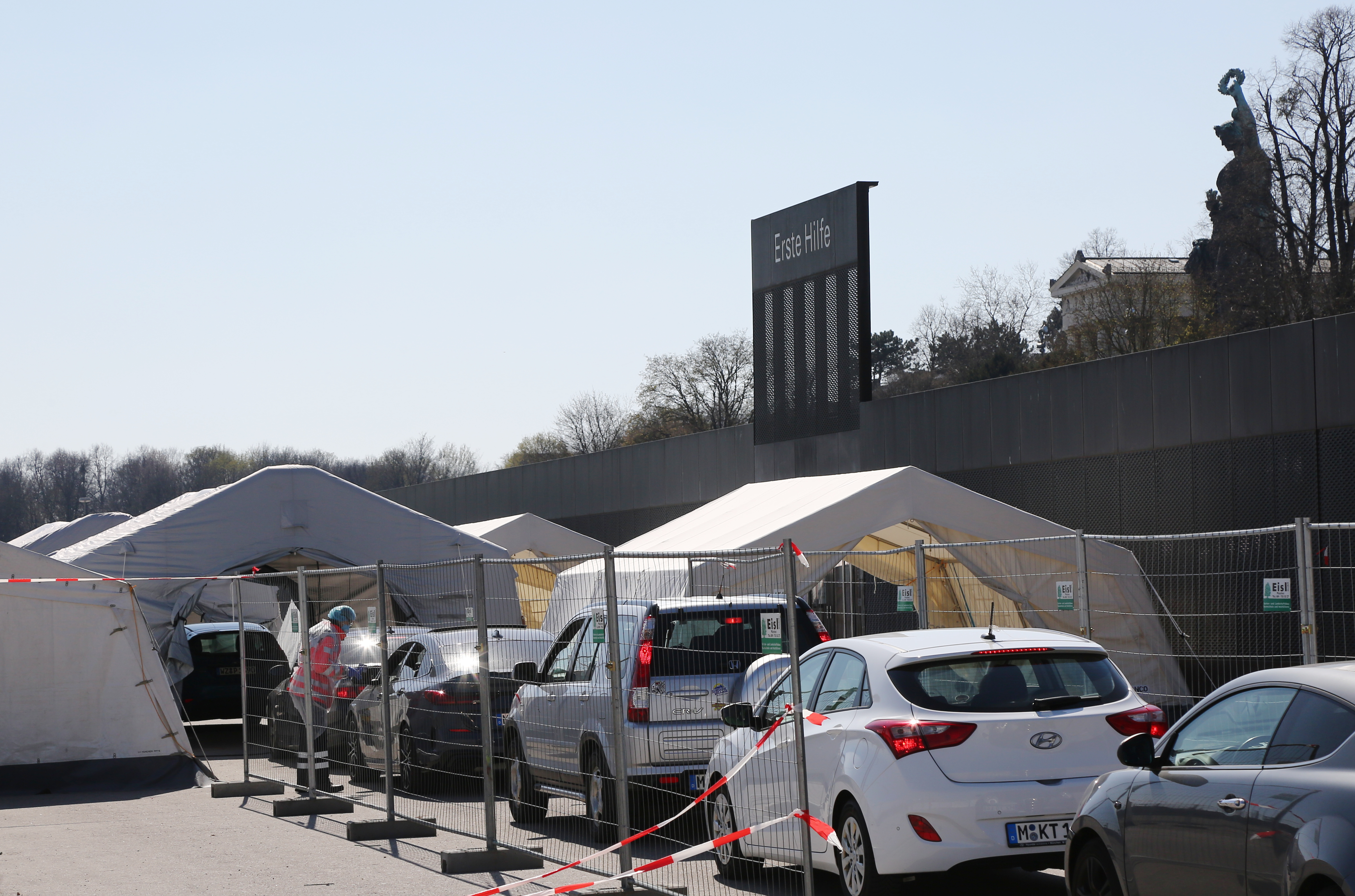 Temporäre Abnahme-Station für CoVid19-Tests auf der Münchner Theresienwiese. April 2020